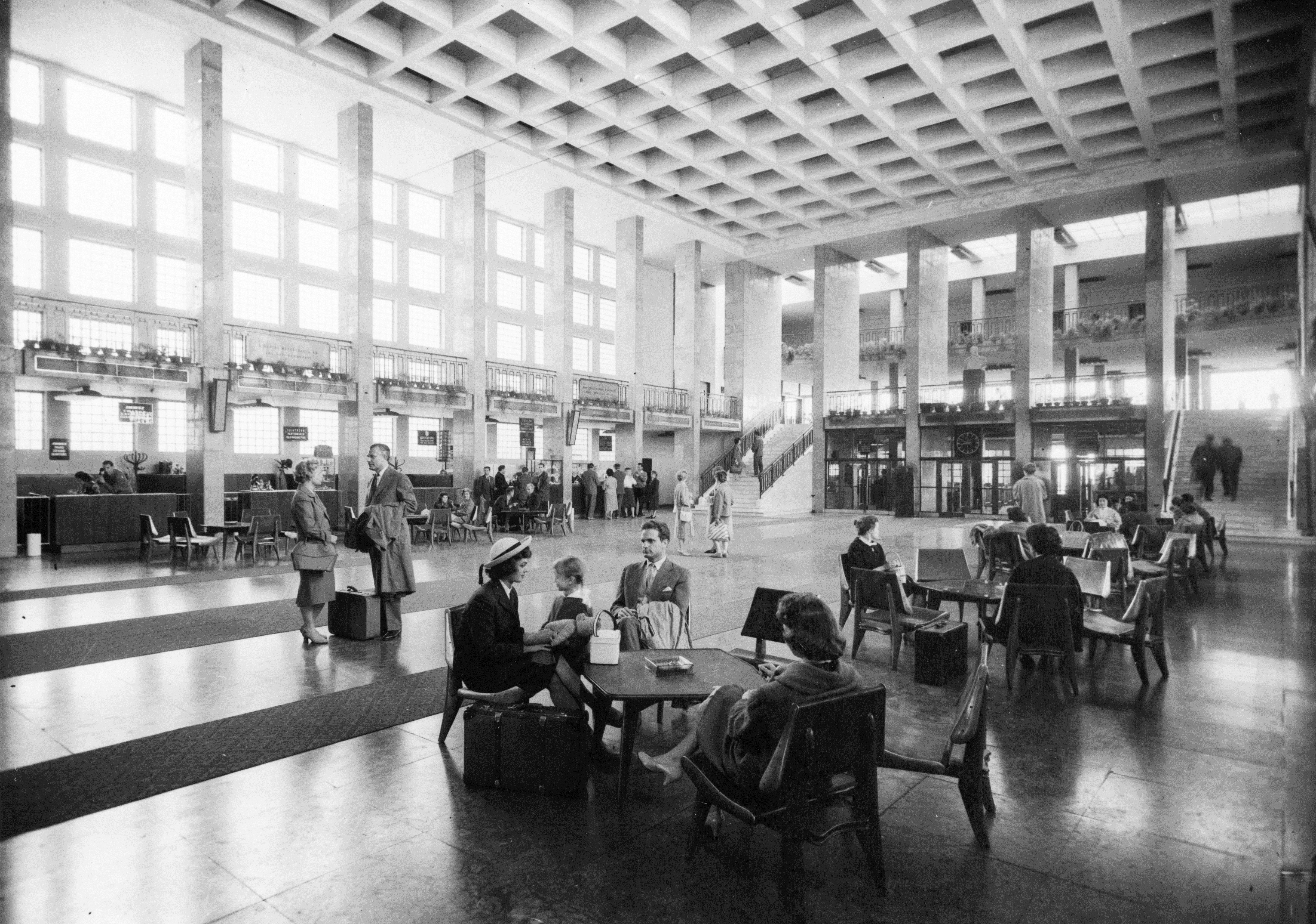 várócsarnok. Location: Hungary, Budapest XVIII. Tags: Budapest, genre painting, waiting room, suitcase Title: várócsarnok.